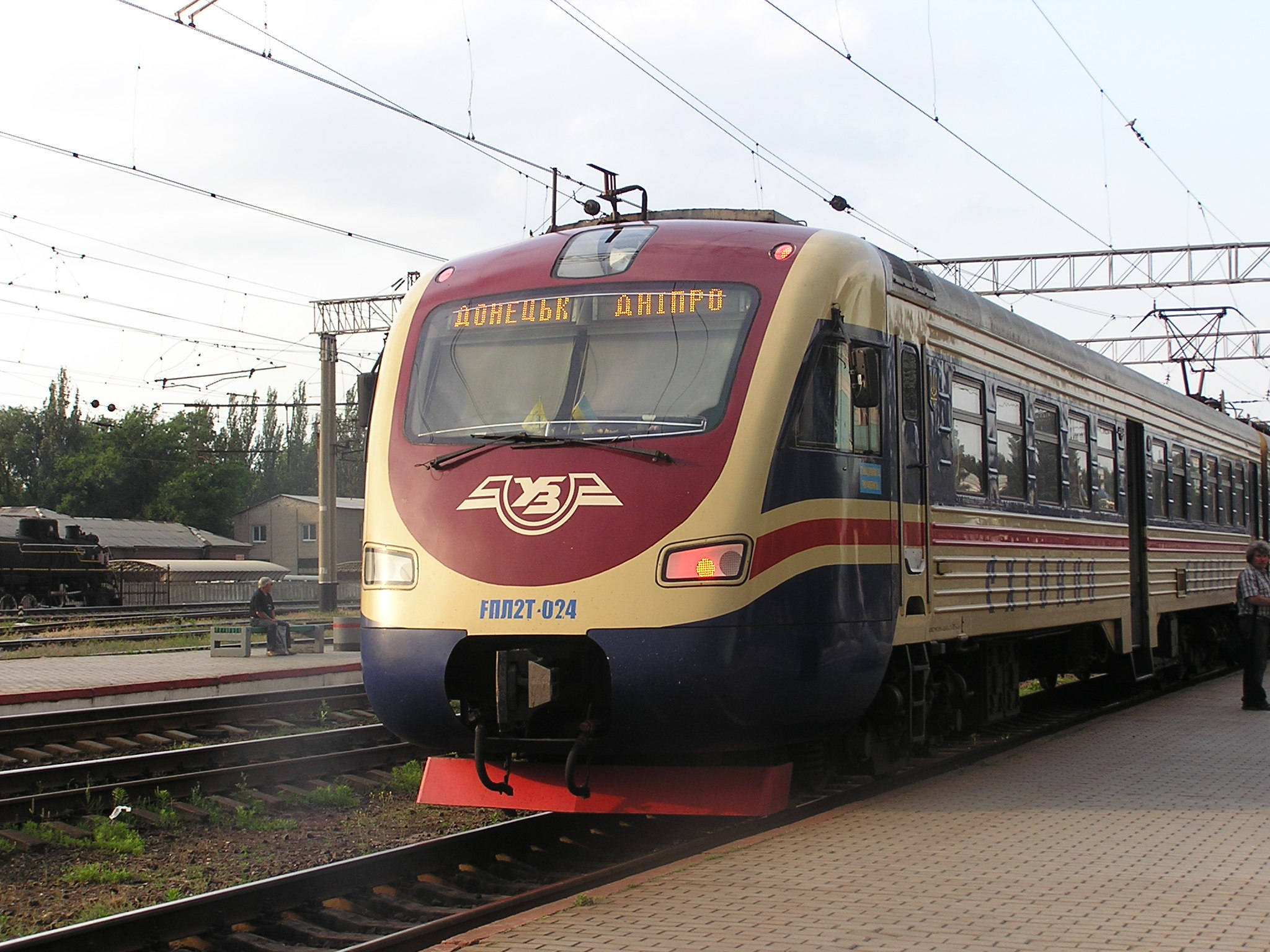 ЖД вокзал в Донецке.